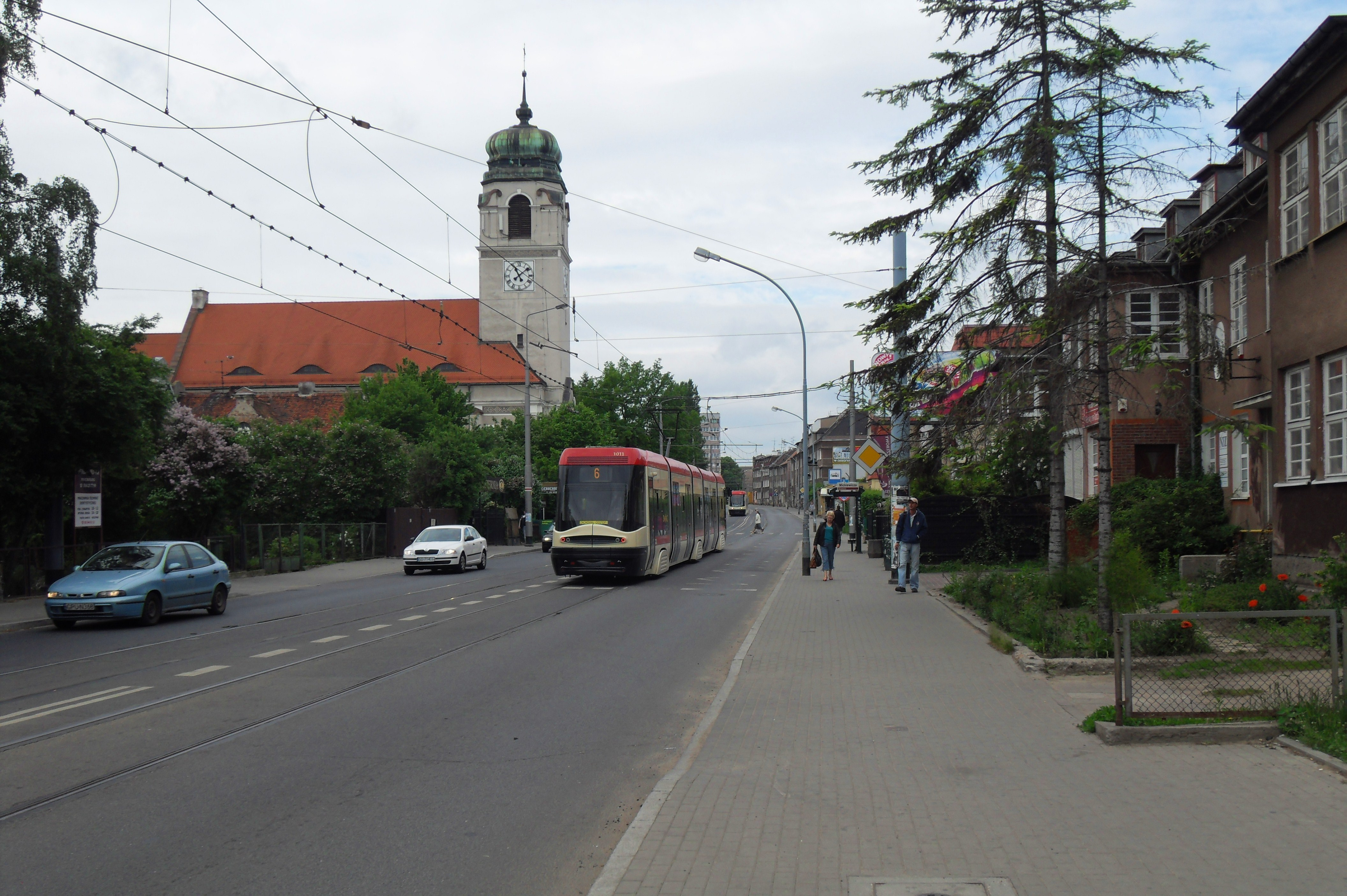 Gdańsk Wrzeszcz Dolny, ul. Mickiewicza.